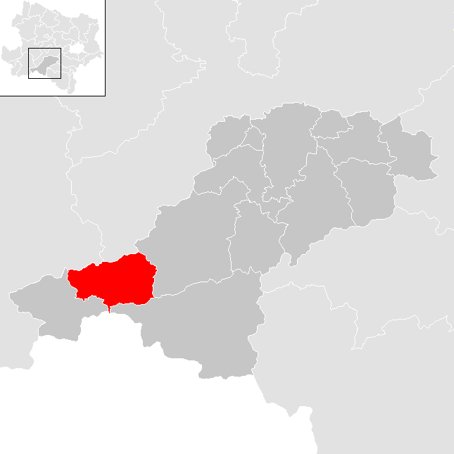 Bezirk Lilienfeld